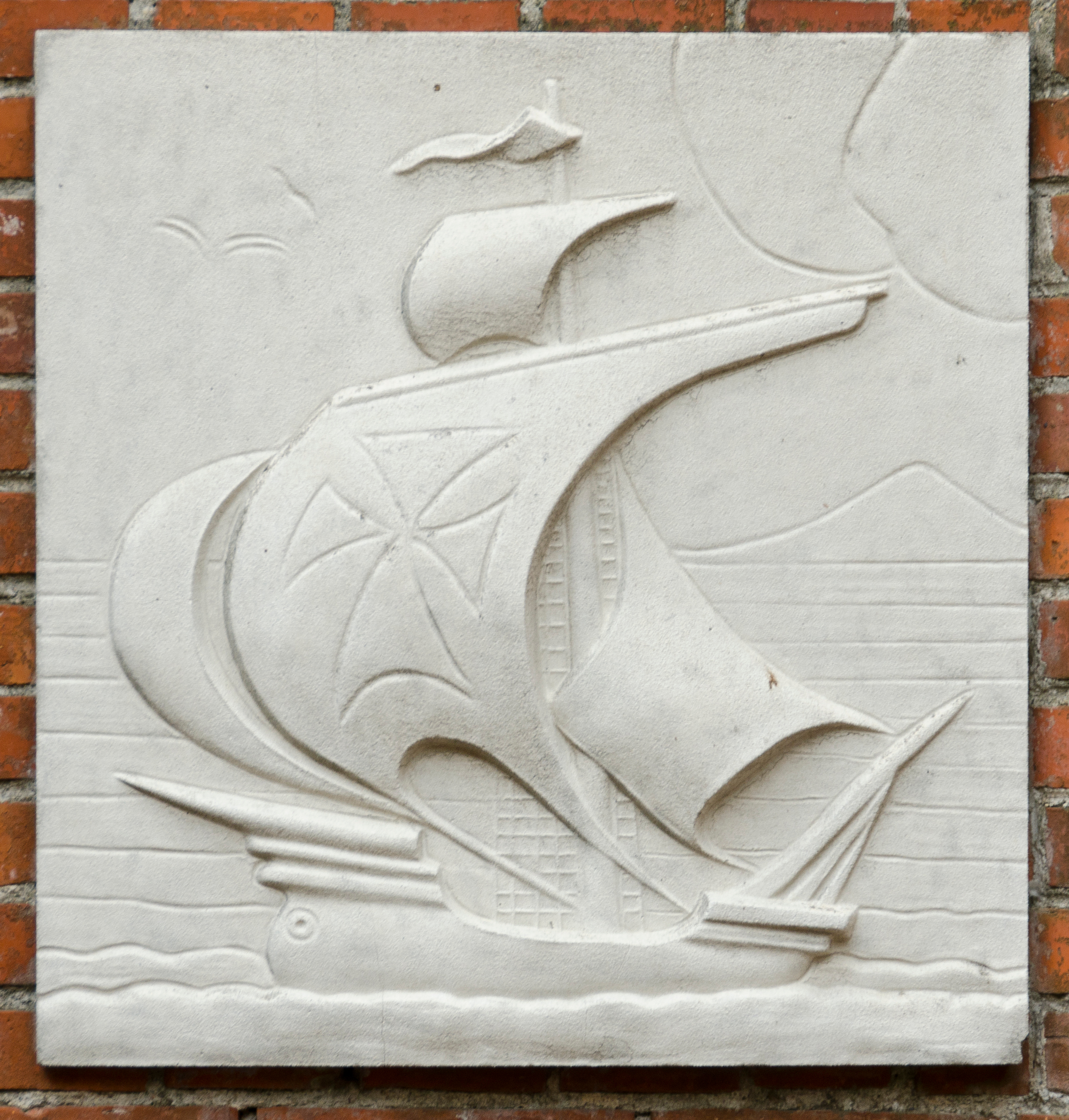 Detalle del interior del castillo Pittamiglio una carabela navegando